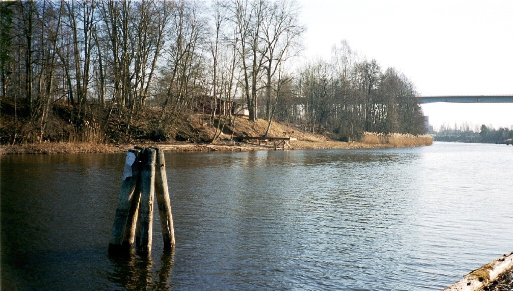 Norsälvens vid Älvenäs.